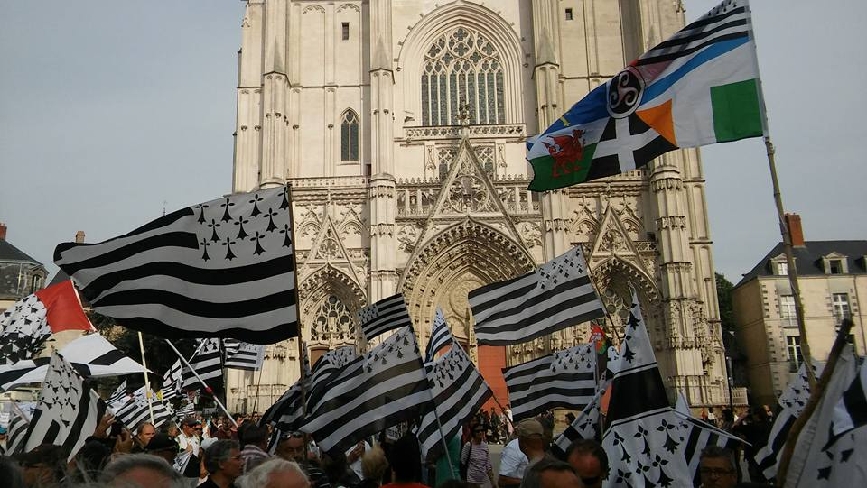 Flotte de drapeaux bretons et panceltique devant la cathédrale Saint-Pierre et Saint-Paul pendant la Breizh Manif (Manifestation pour la réunification de la Bretagne) à Nantes le 24 septembre 2016